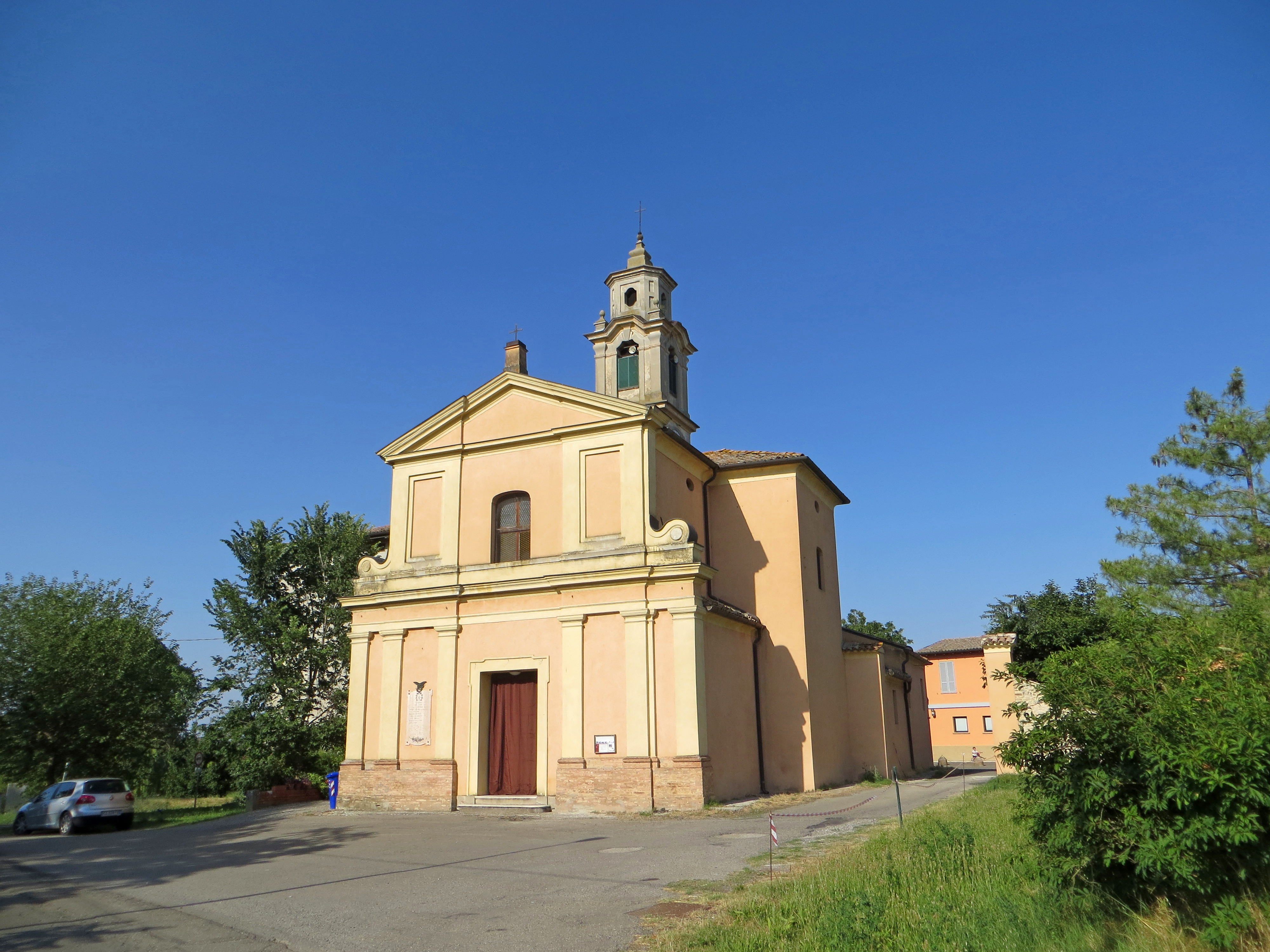 Chiesa di San Martino (San Martino Sinzano, Collecchio) - facciata e lato sud